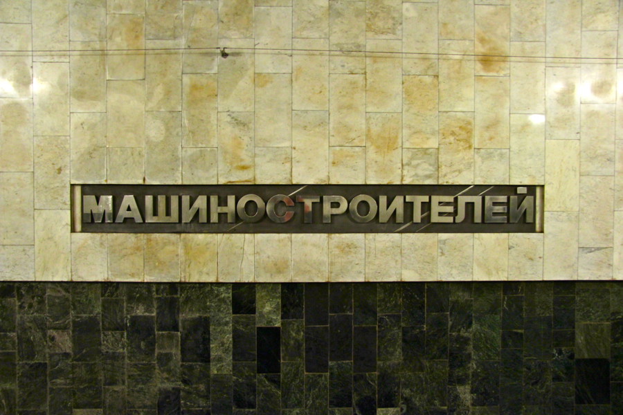 Yekaterinburg Metro (Екатеринбургский метрополитен)